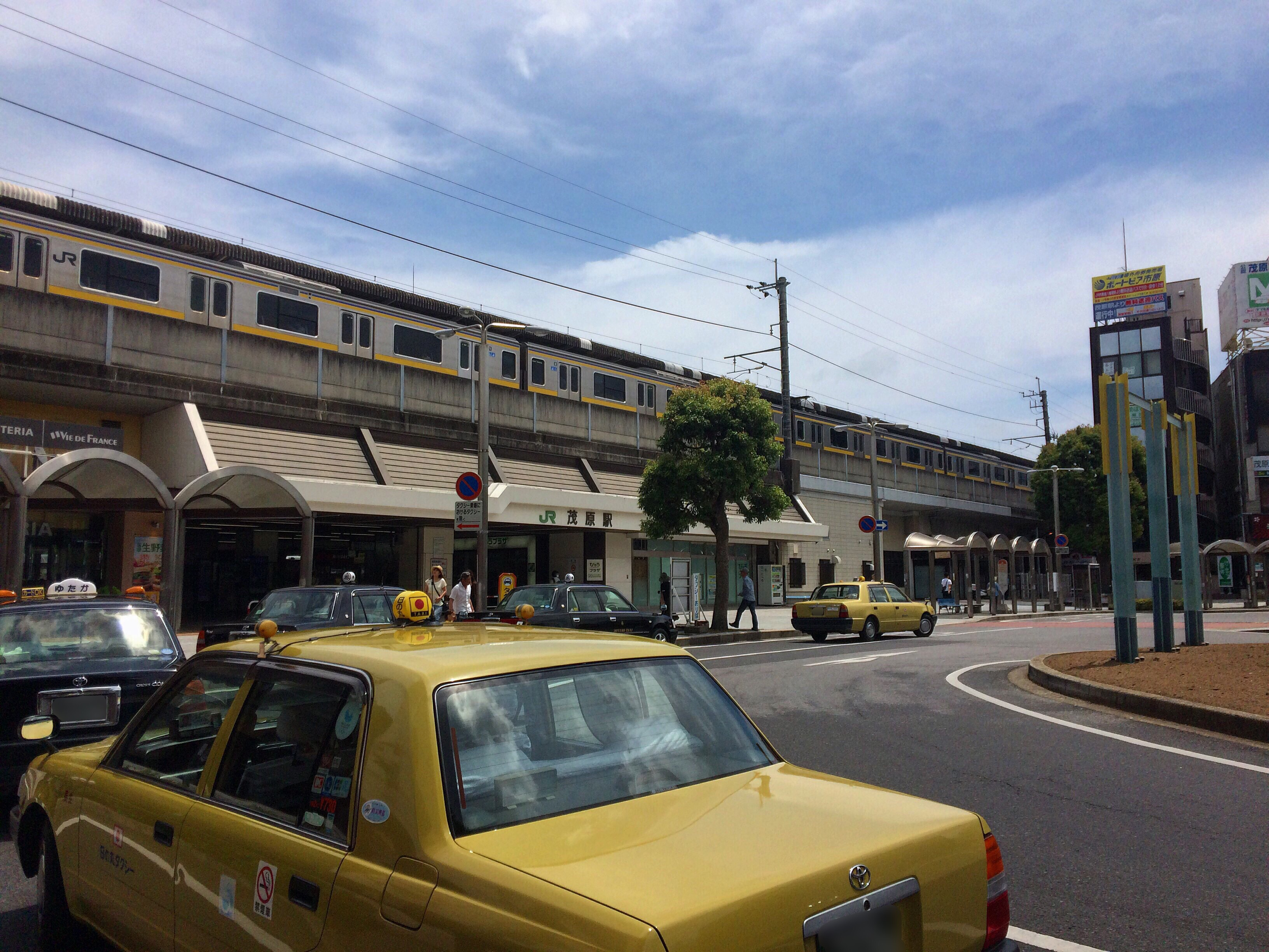 茂原駅南口